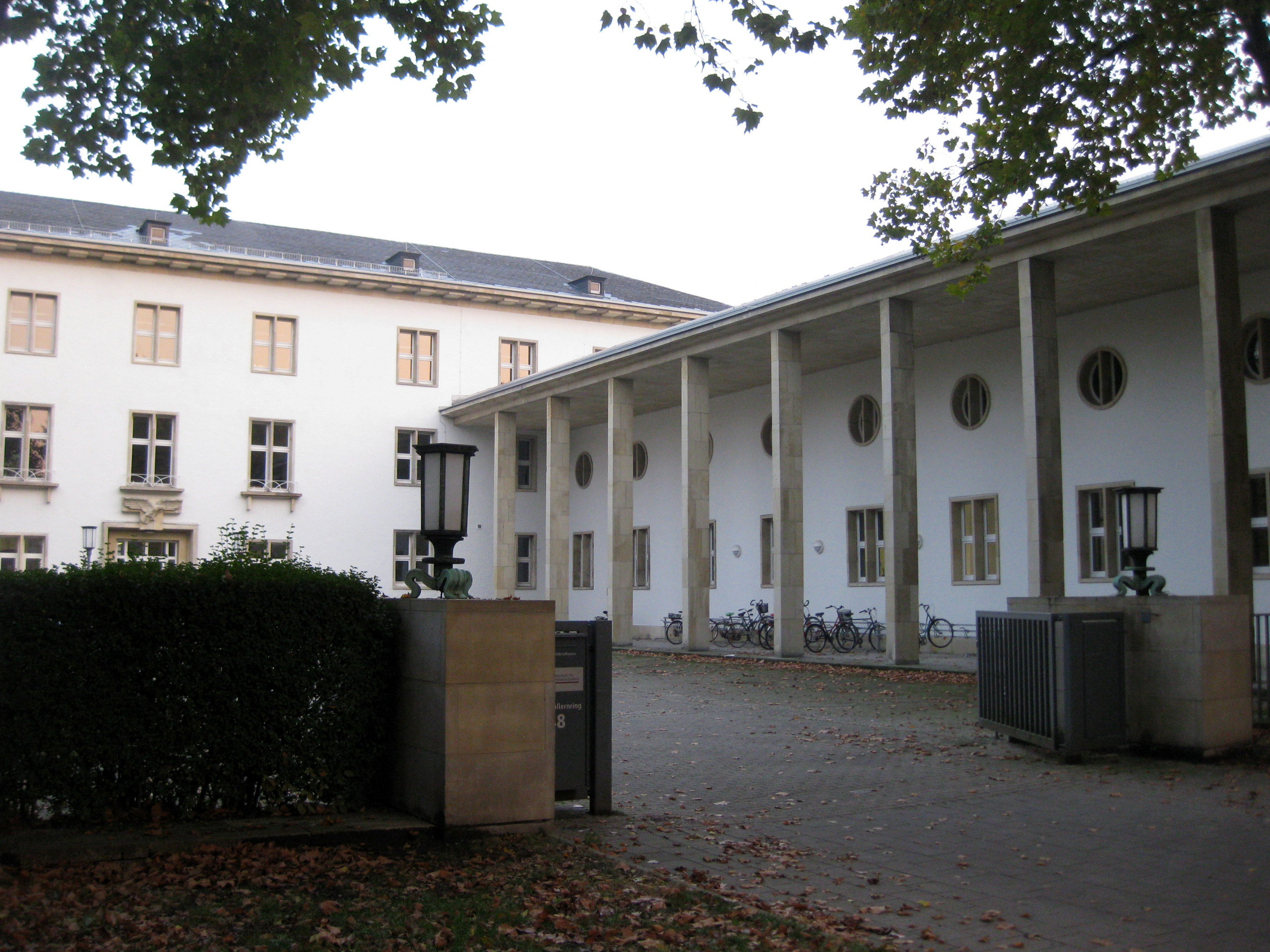 Bauen im Nationalsozialismus